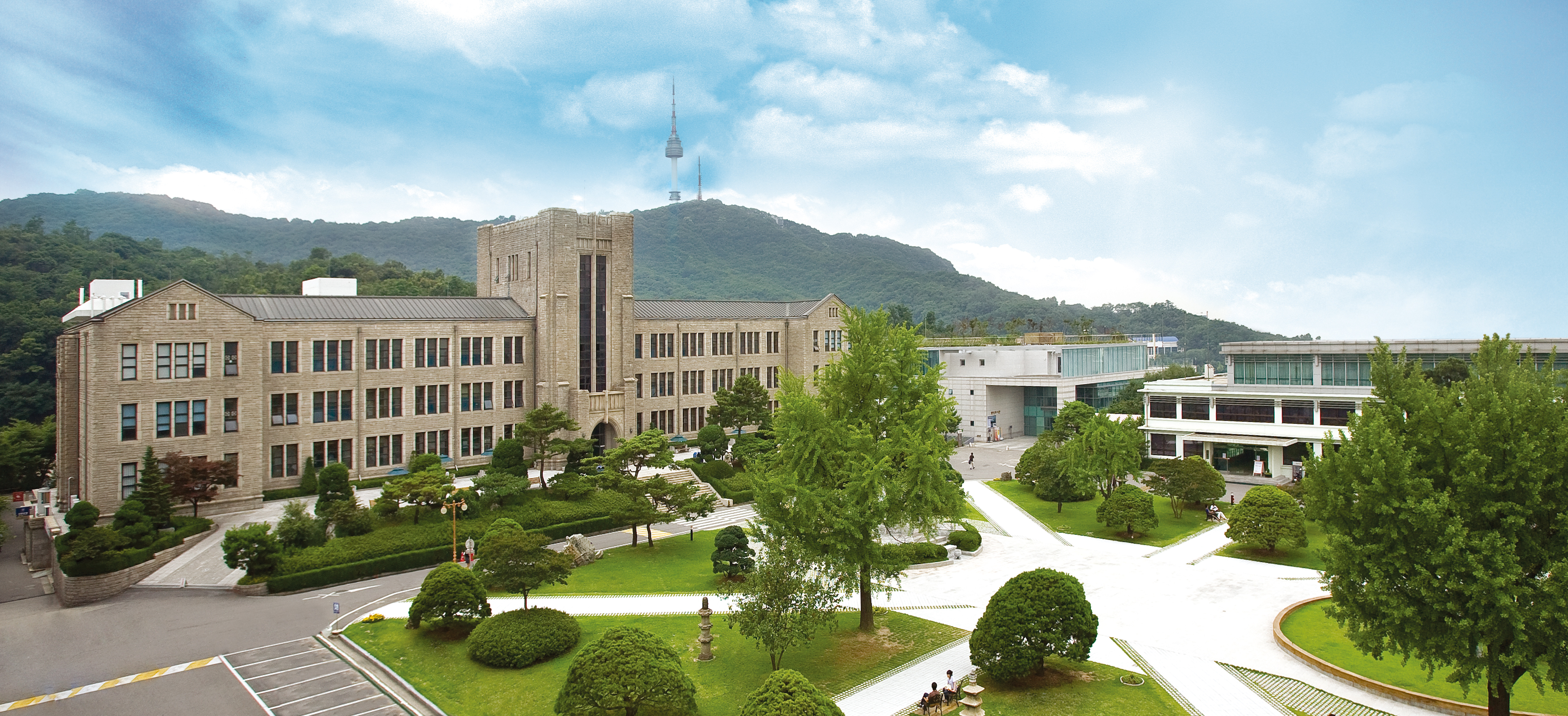 DONGGUK UNIVERSITY